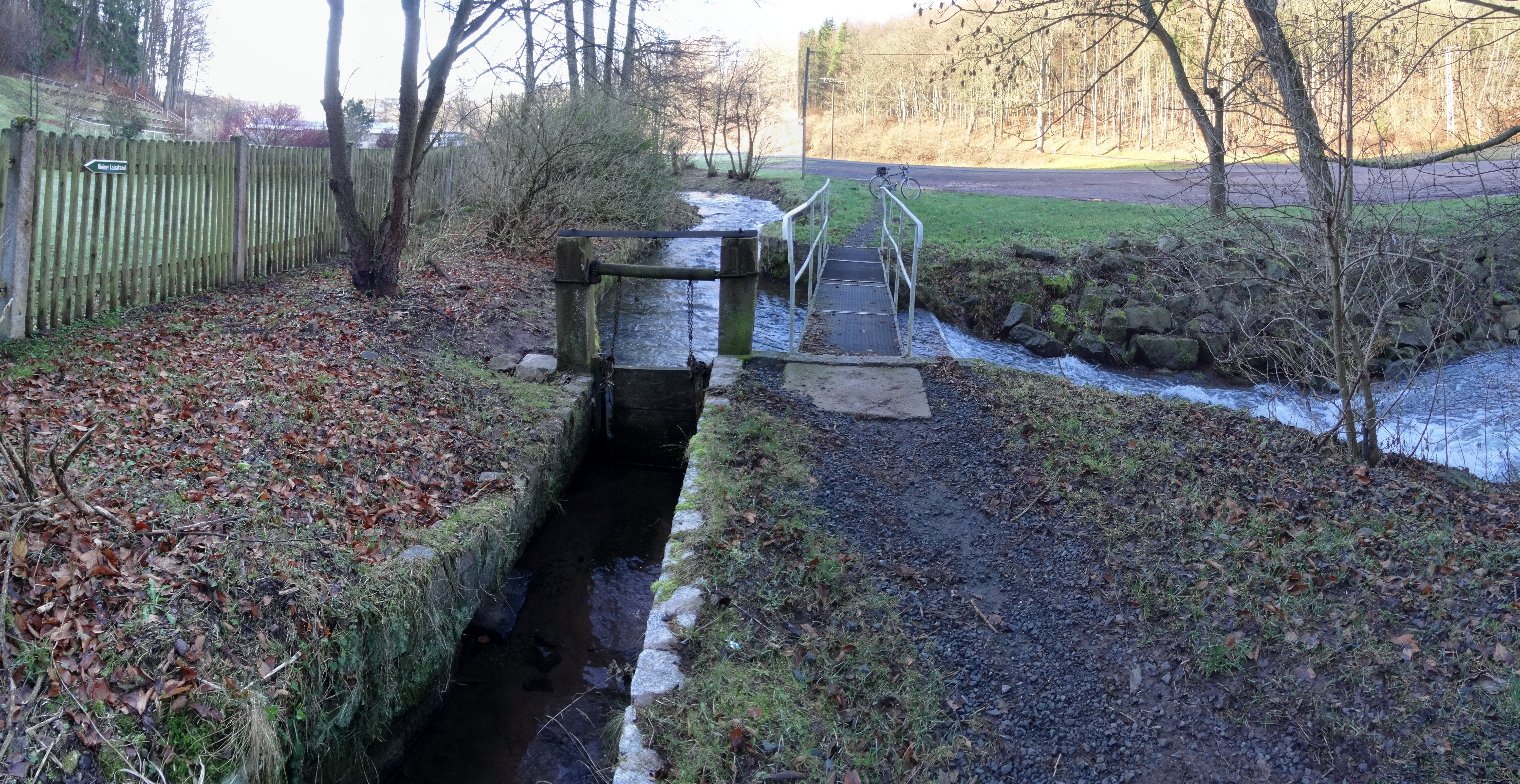 Am Freibad Schönau wird der Kleine Leinakanal (vorne) von der Leina abgetrennt.